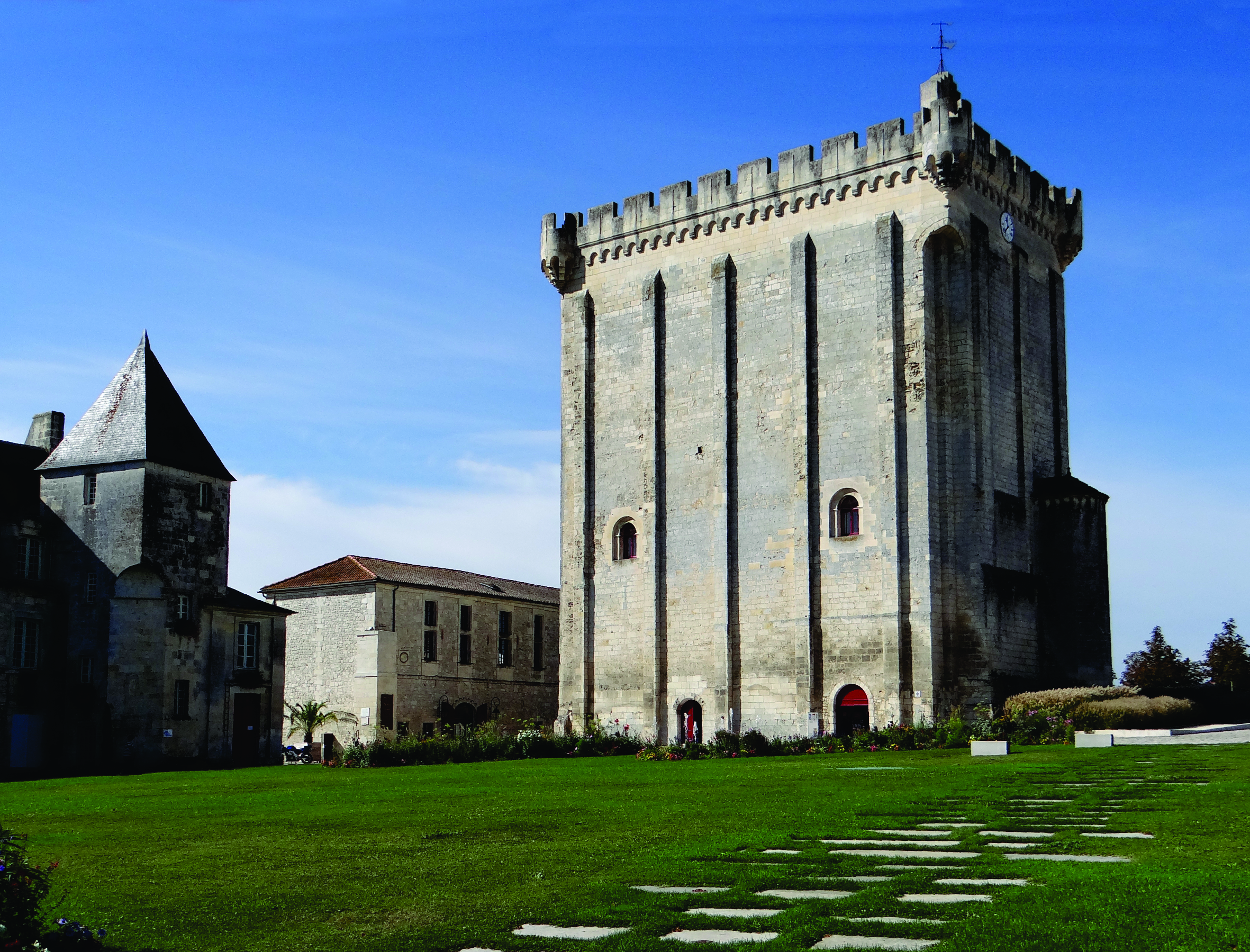 De donjon van Pons - Charente-Maritime, Poitou-Charentes. De toren (XIIe eeuw) maakte deel uit van het kasteel van Pons. Het is het bijzonderste overblijfsel van dit versterkt kasteel.